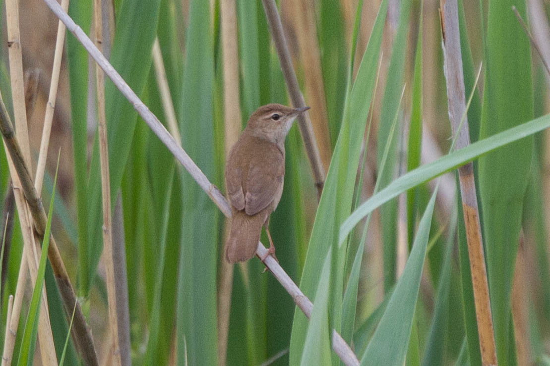 Savi's Warbler (Locustella luscinioides)